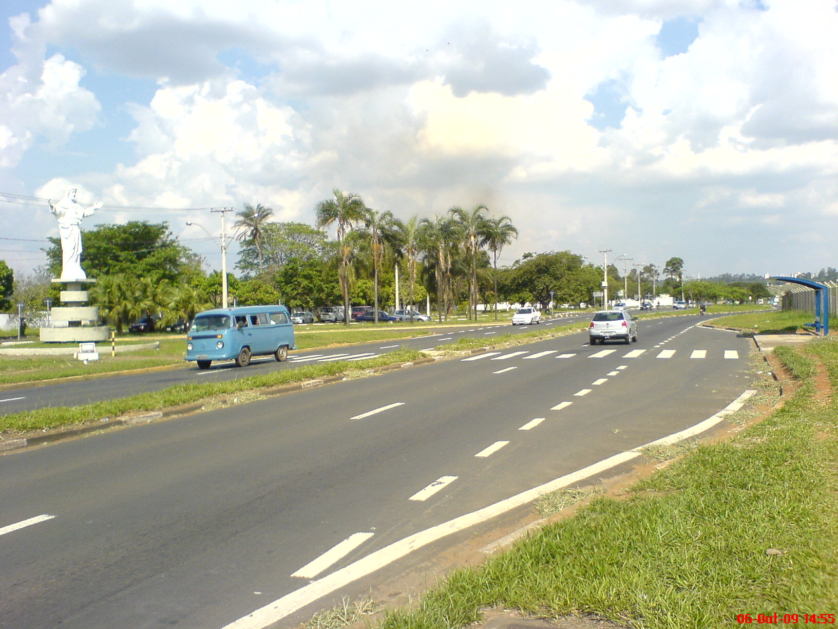 Estrada dos Amarais ao lado do Cemiterio